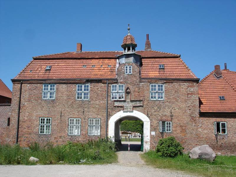 Torhaus Gut Ludwigsburg